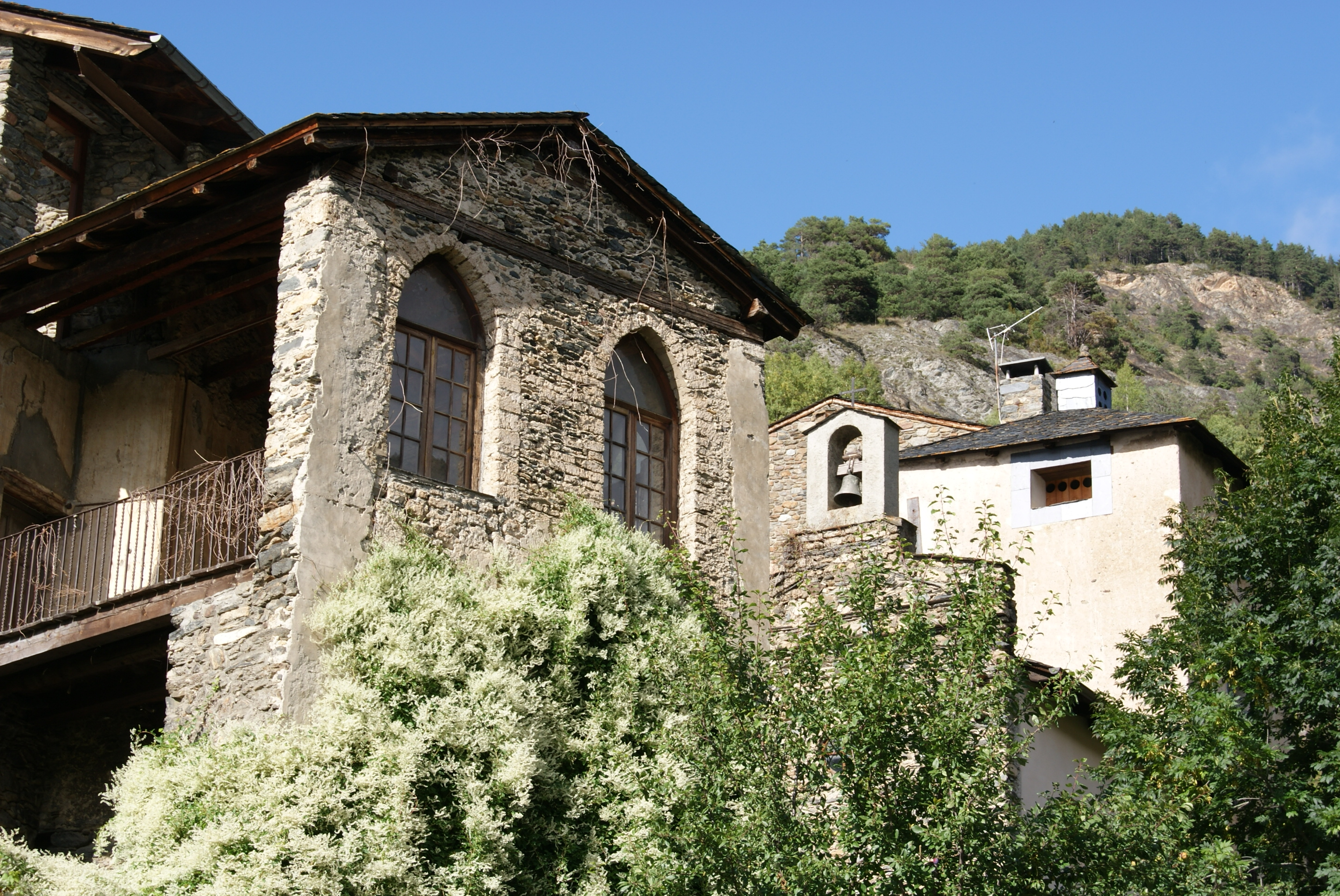 Casa Rossell (Ordino)